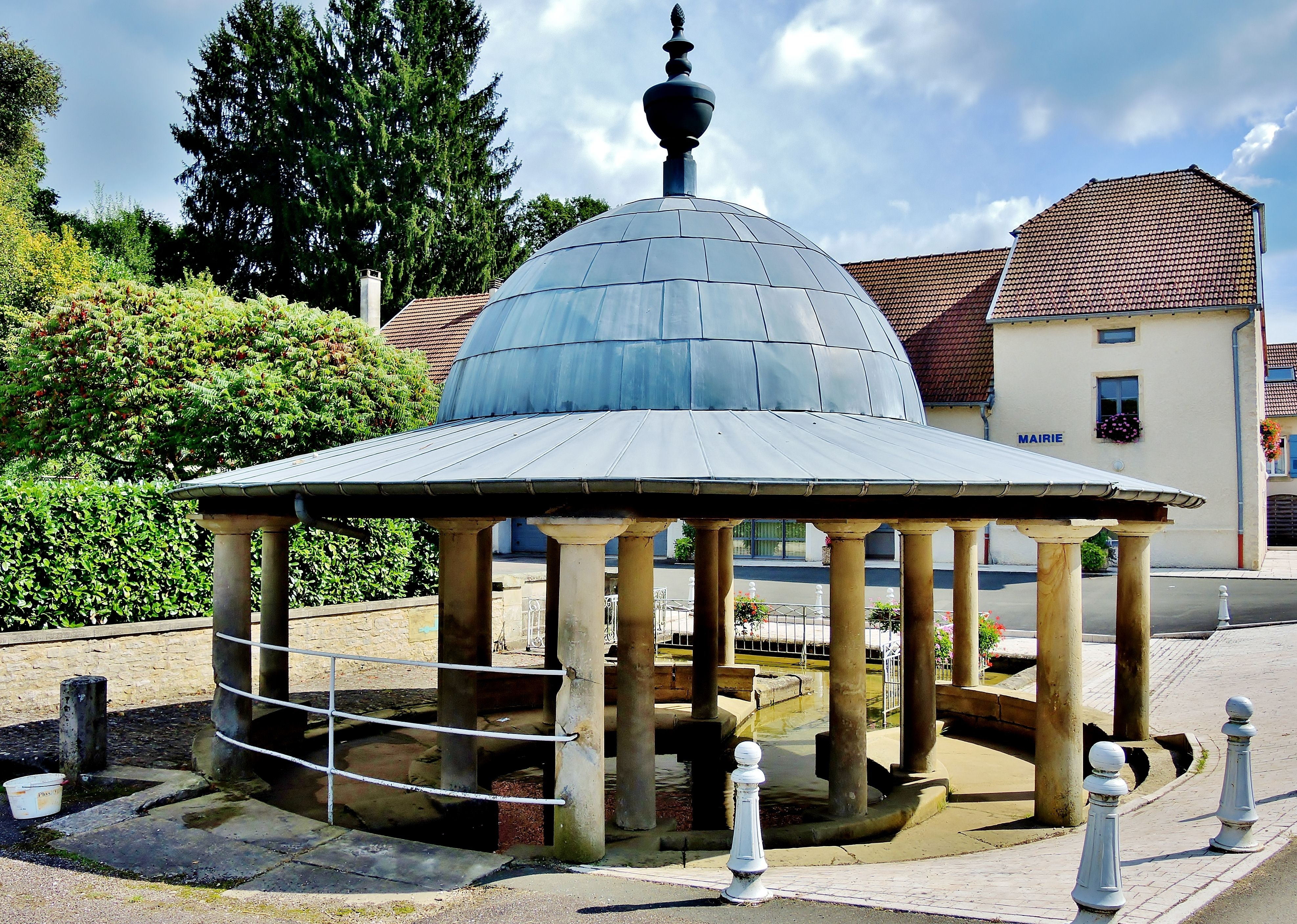 Fontaine-lavoir de Fontenois-lès-Montbozon